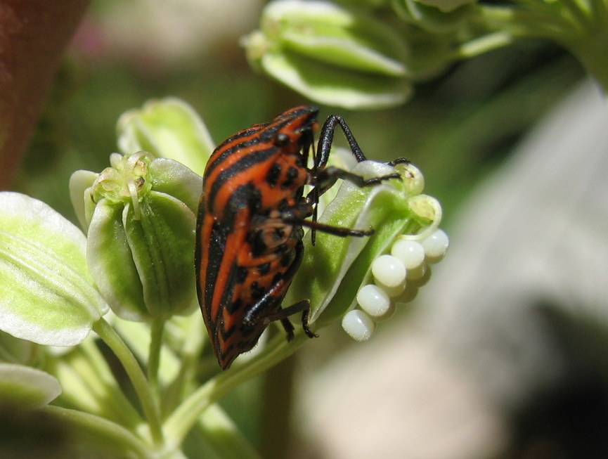 Graphosoma italicum ' cuidando su puesta. Bordes de Quanca, Tavascán (Lérida)